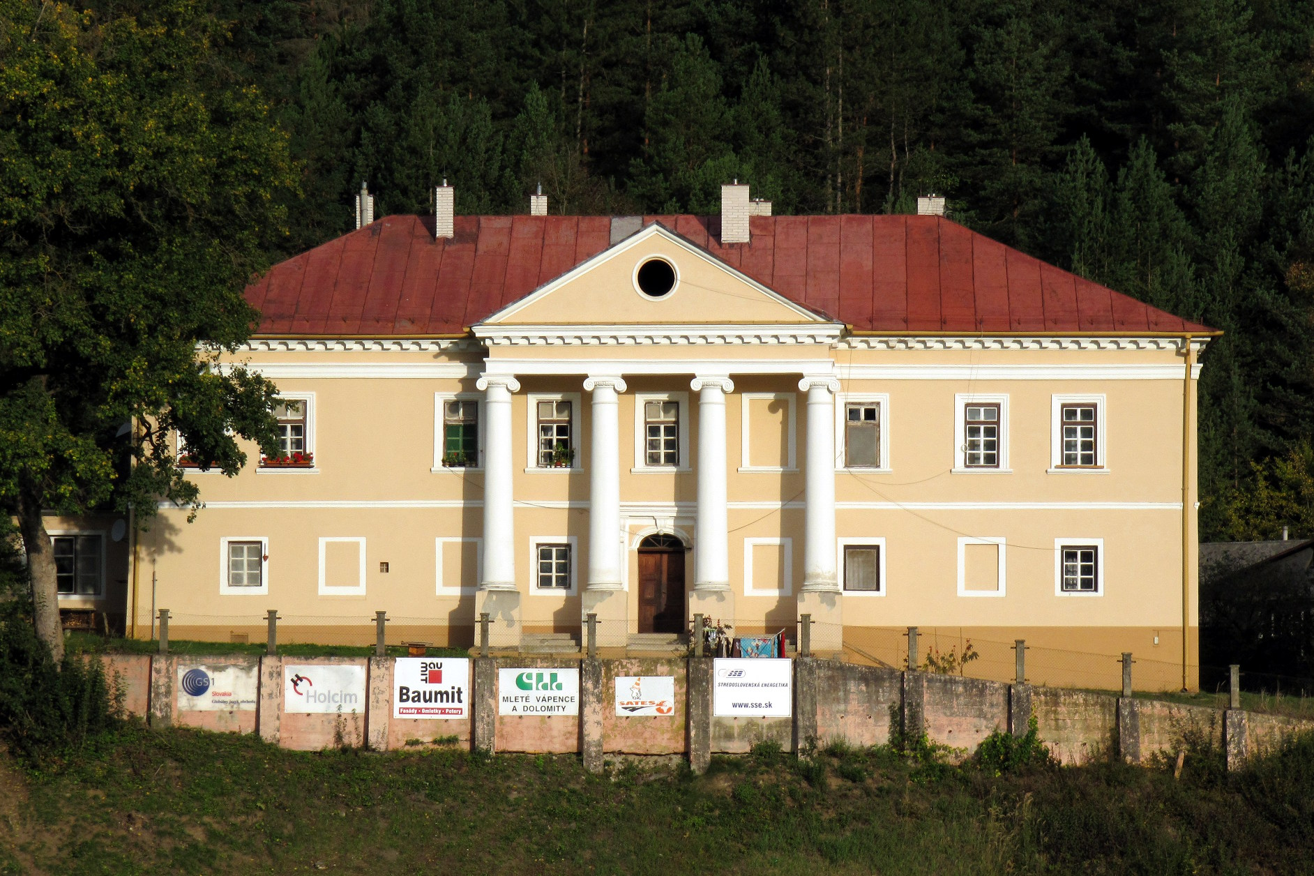 Lietavská Lúčka, Pongrácovský kaštieľ, Vznik: 1820